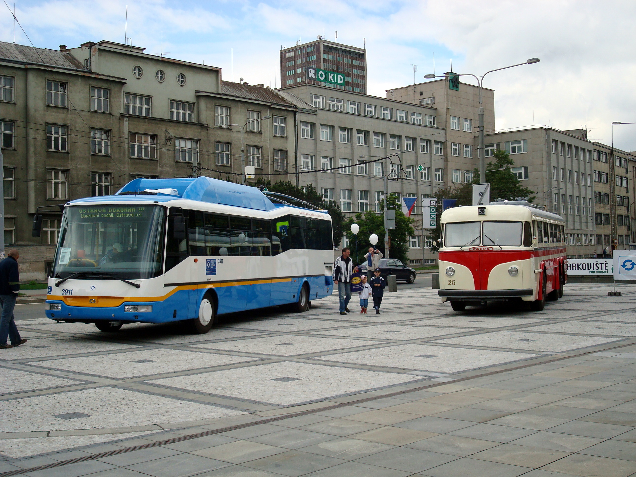 Trolejbus SOR TN 12 C a historický trolejbus Tatra T 400 v Ostravě